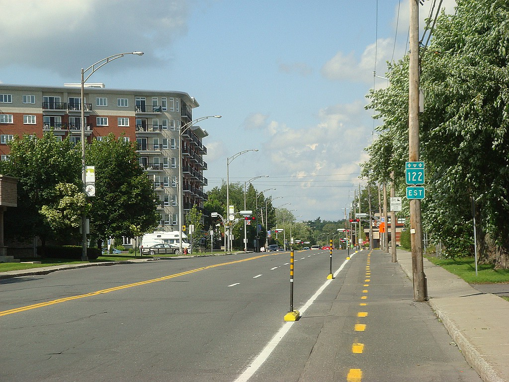 Photo de la route 122, à Drummondville, Québec, Canada.